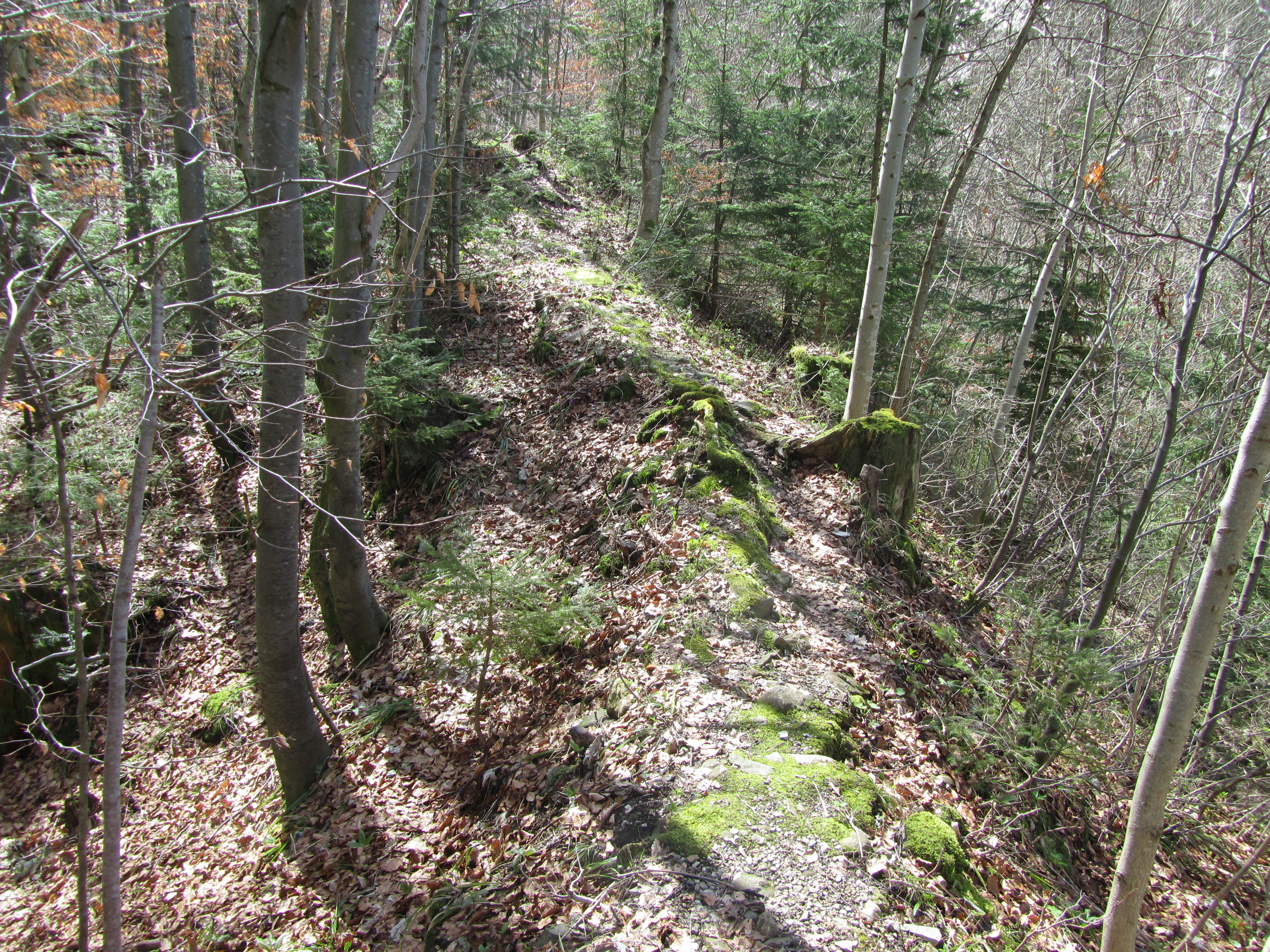 Burgruine Wildenegg (Wildeneck)